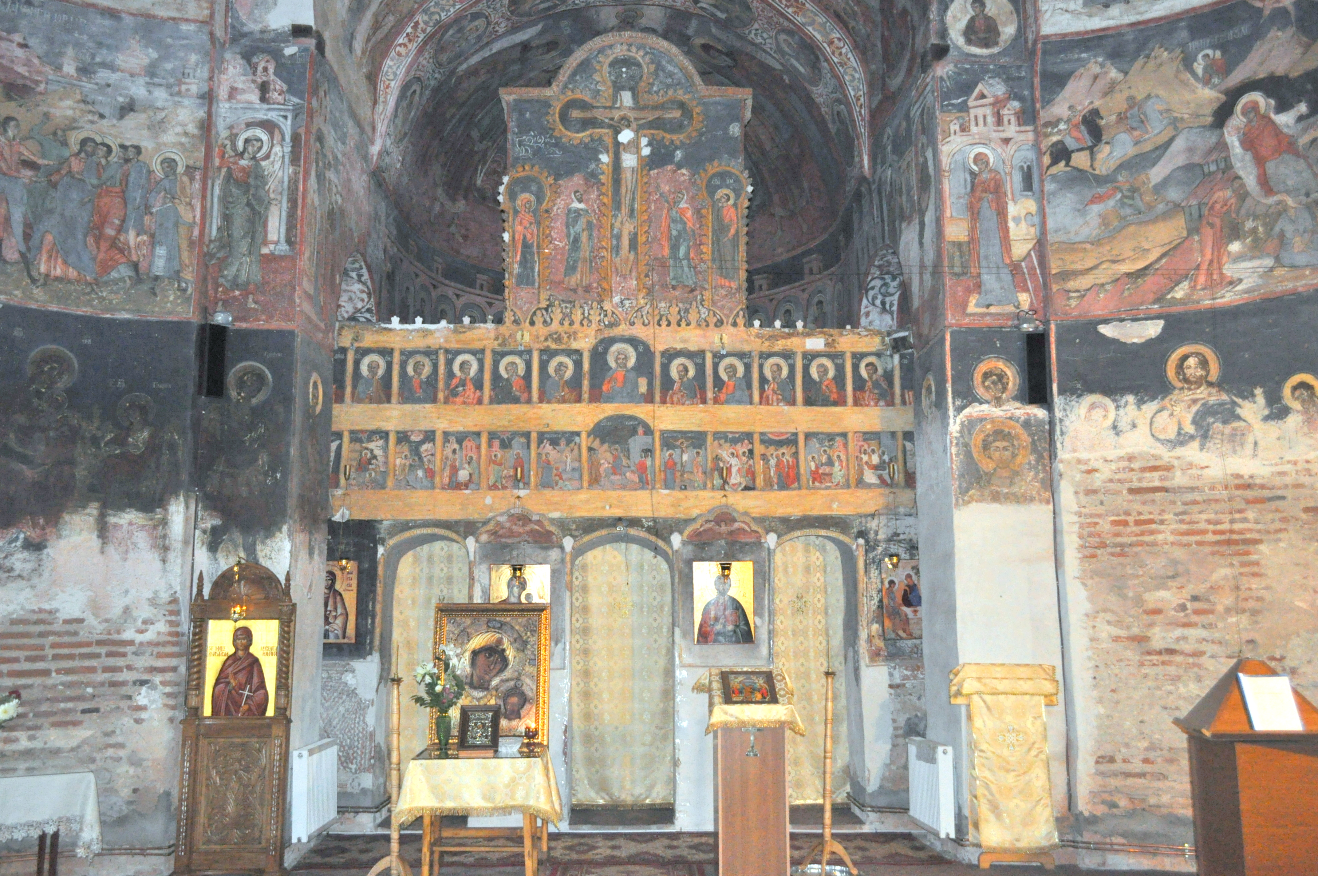 Biserica „Sfânta Treime”, sat Cerneți; comuna Șimian